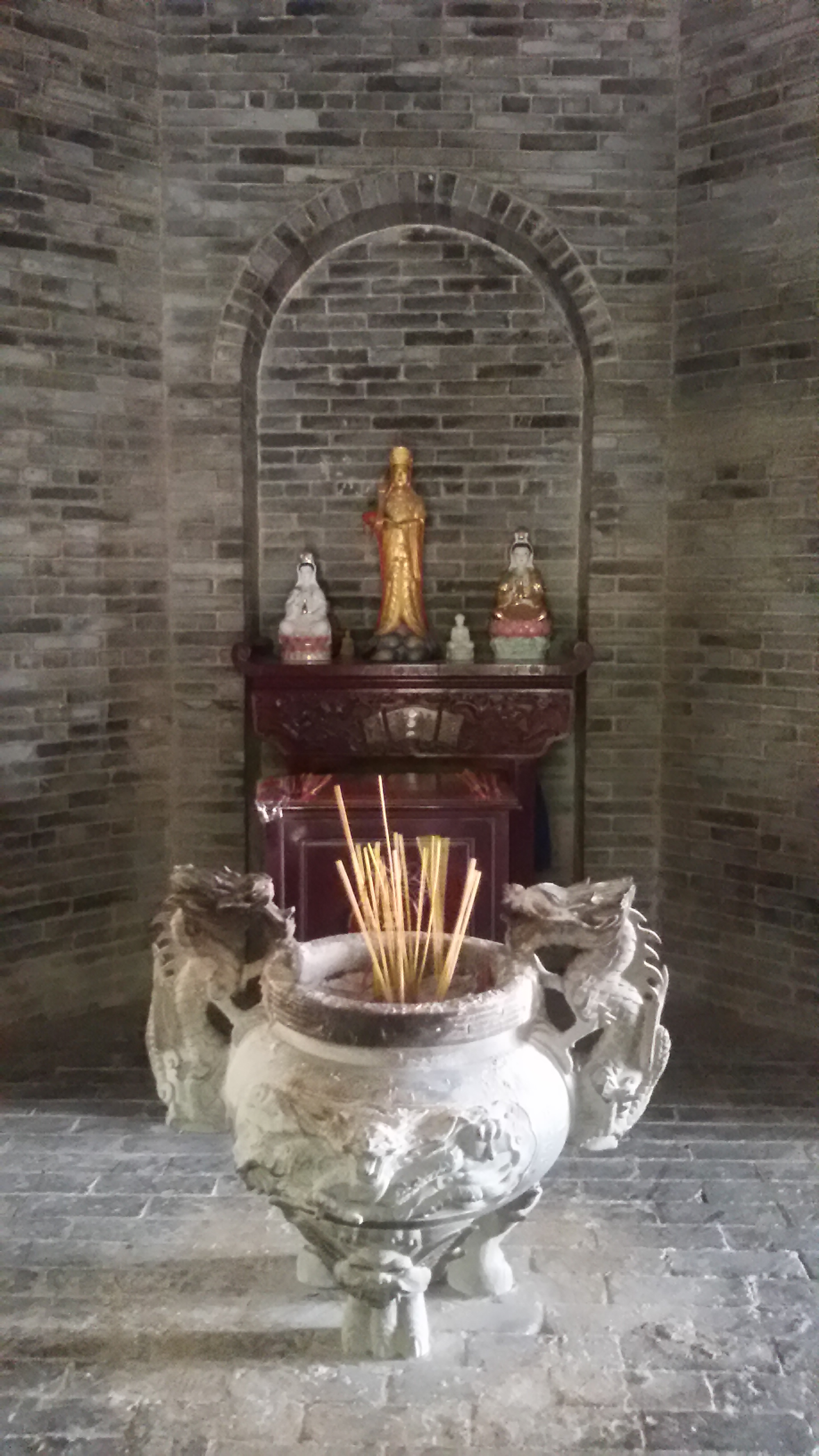 粵語: 南沙天后宮嘅南嶺塔1樓入面啲供奉物